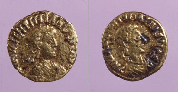 Deux monnaies à l'effigie de Valentinien III mis au jour dans une tombe du site de Saint-Laurent de Grenoble